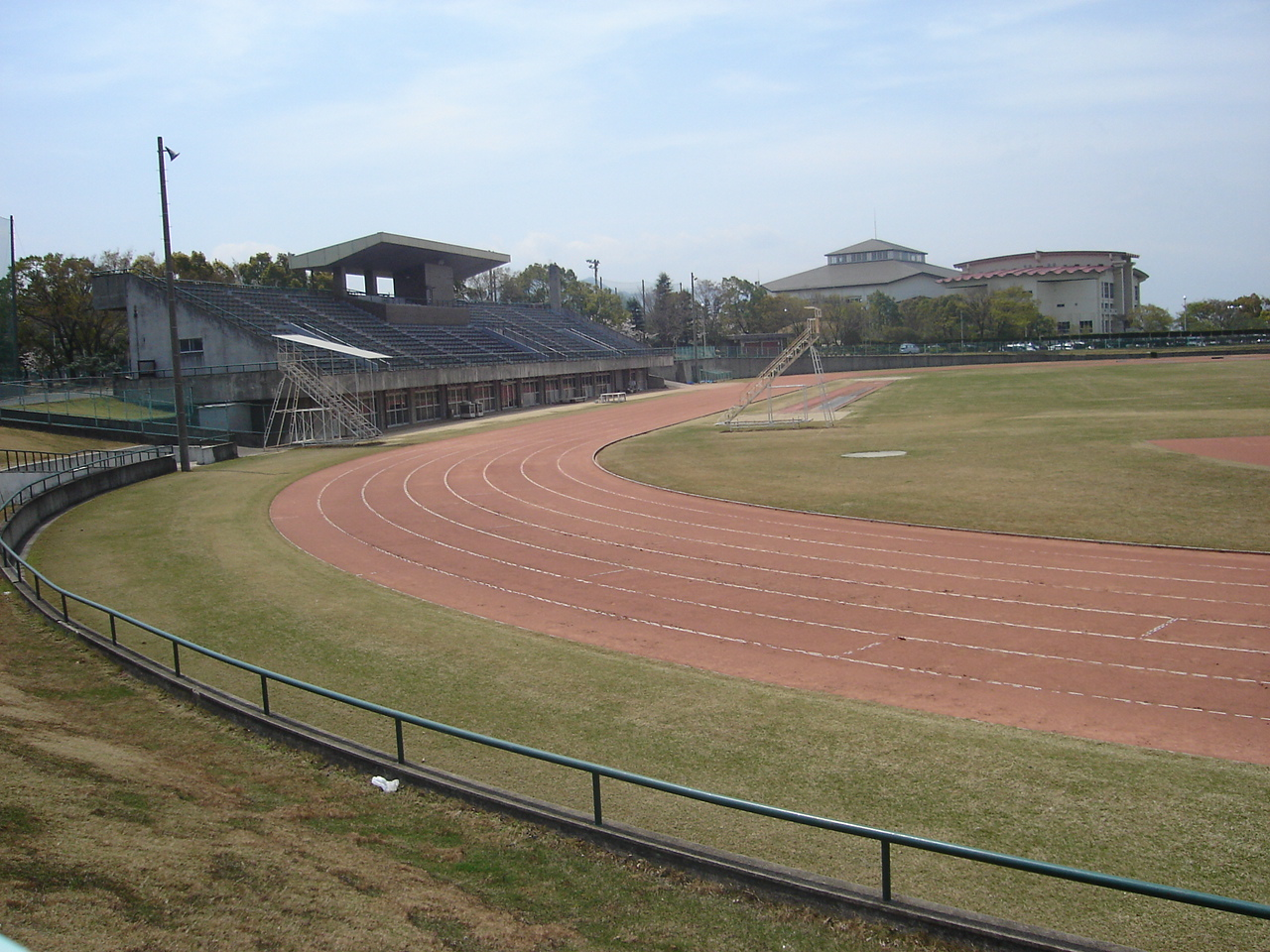 観音寺市総合運動公園陸上競技場。 - 日本国香川県観音寺市にある競技場。